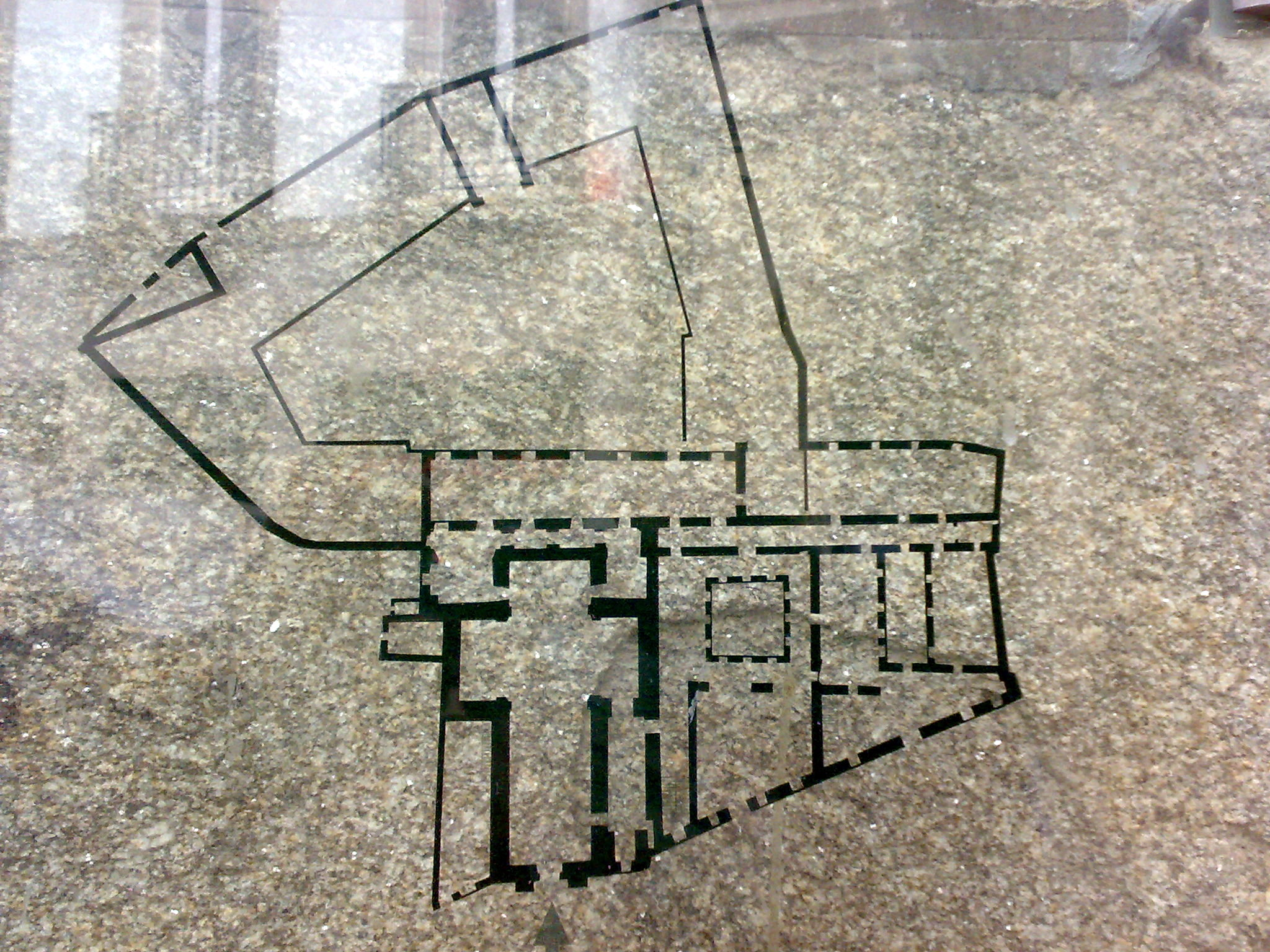 Panel co plano da pranta do Convento, Igrexa e Colexio das Orfas (Santiago de Compostela)